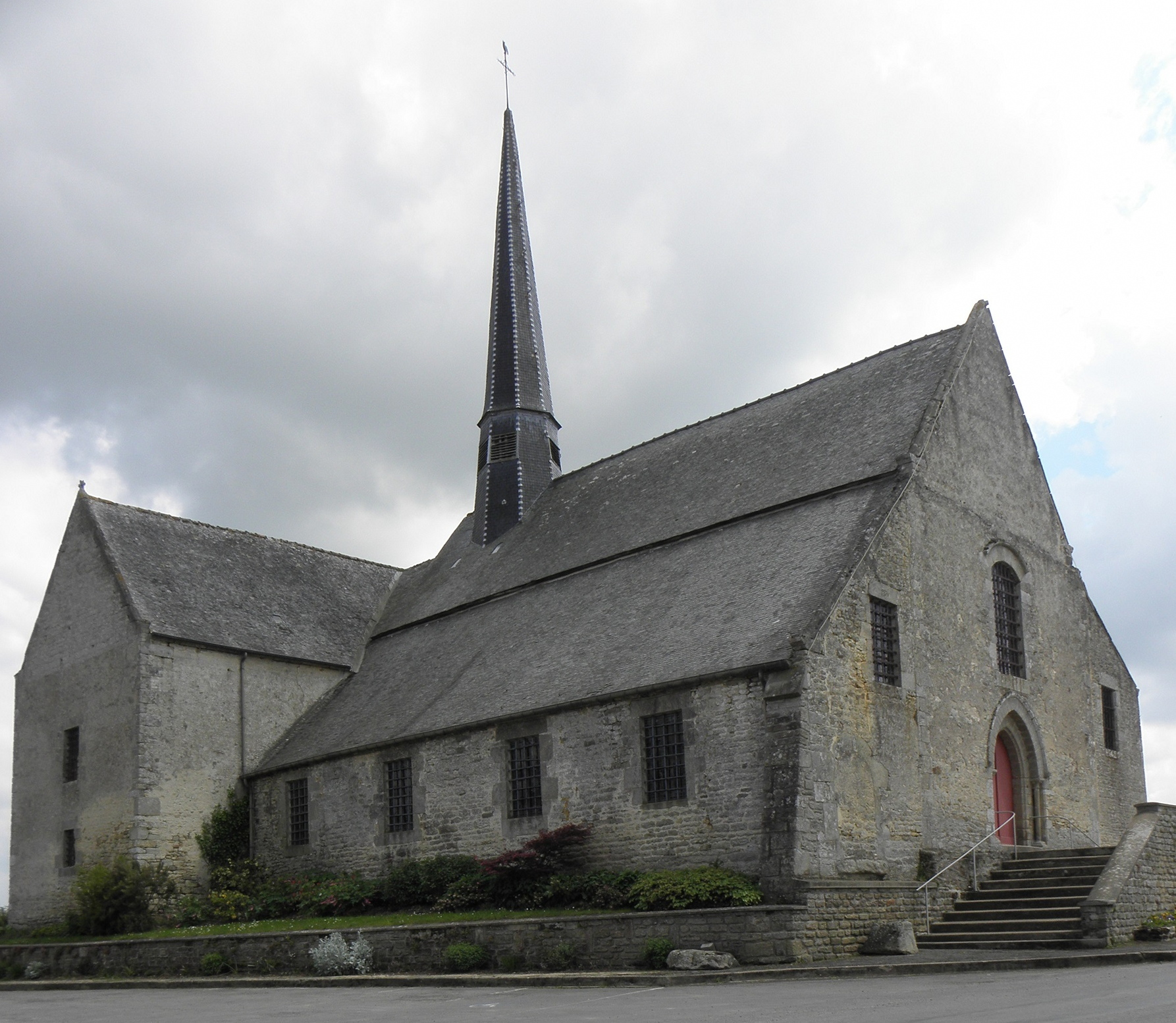 Église Saint-Juvat, commune de Saint-Juvat (22). Façade occidentale et flanc nord.